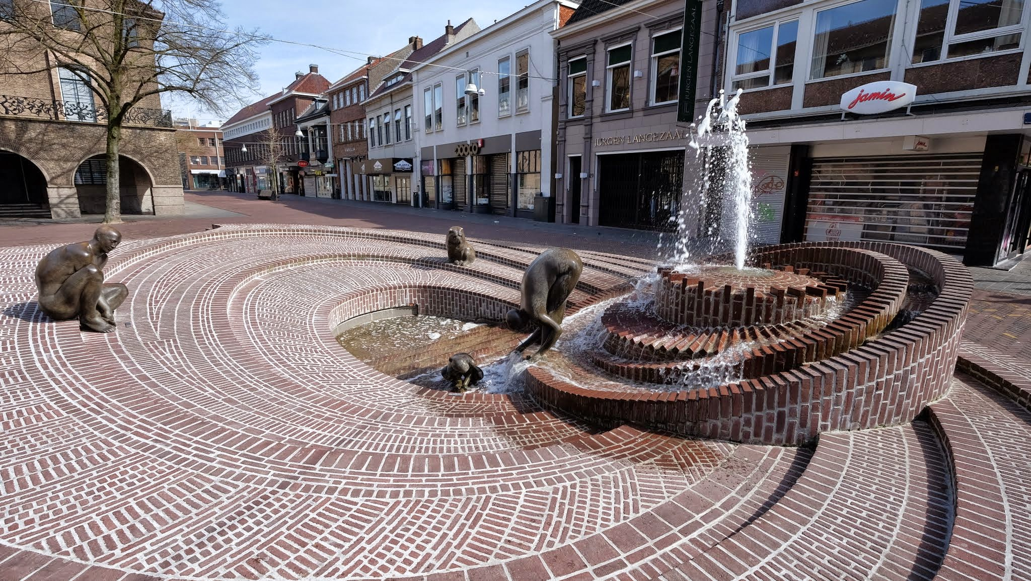 Oude Markt, Enschede, Netherlands